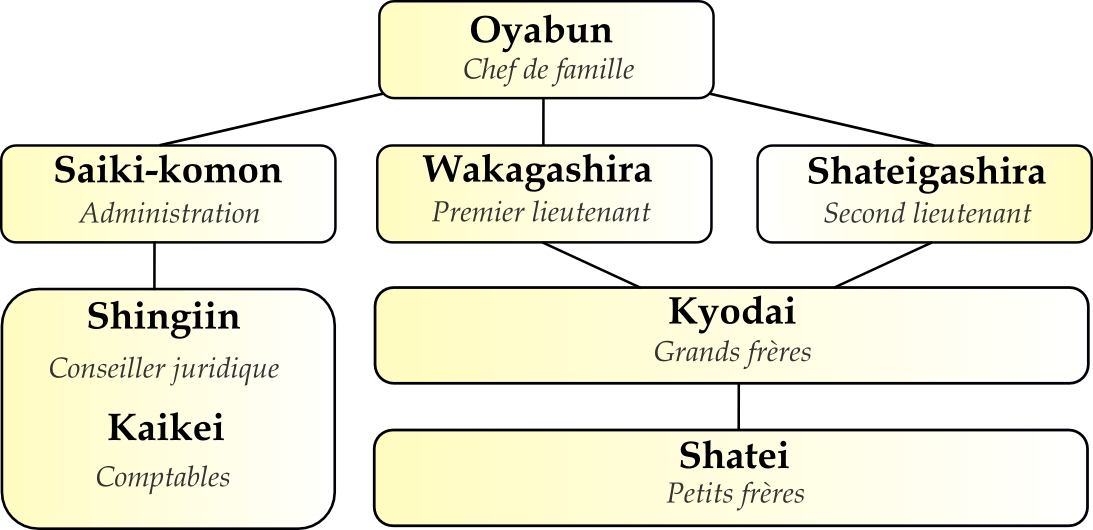 Organigramme